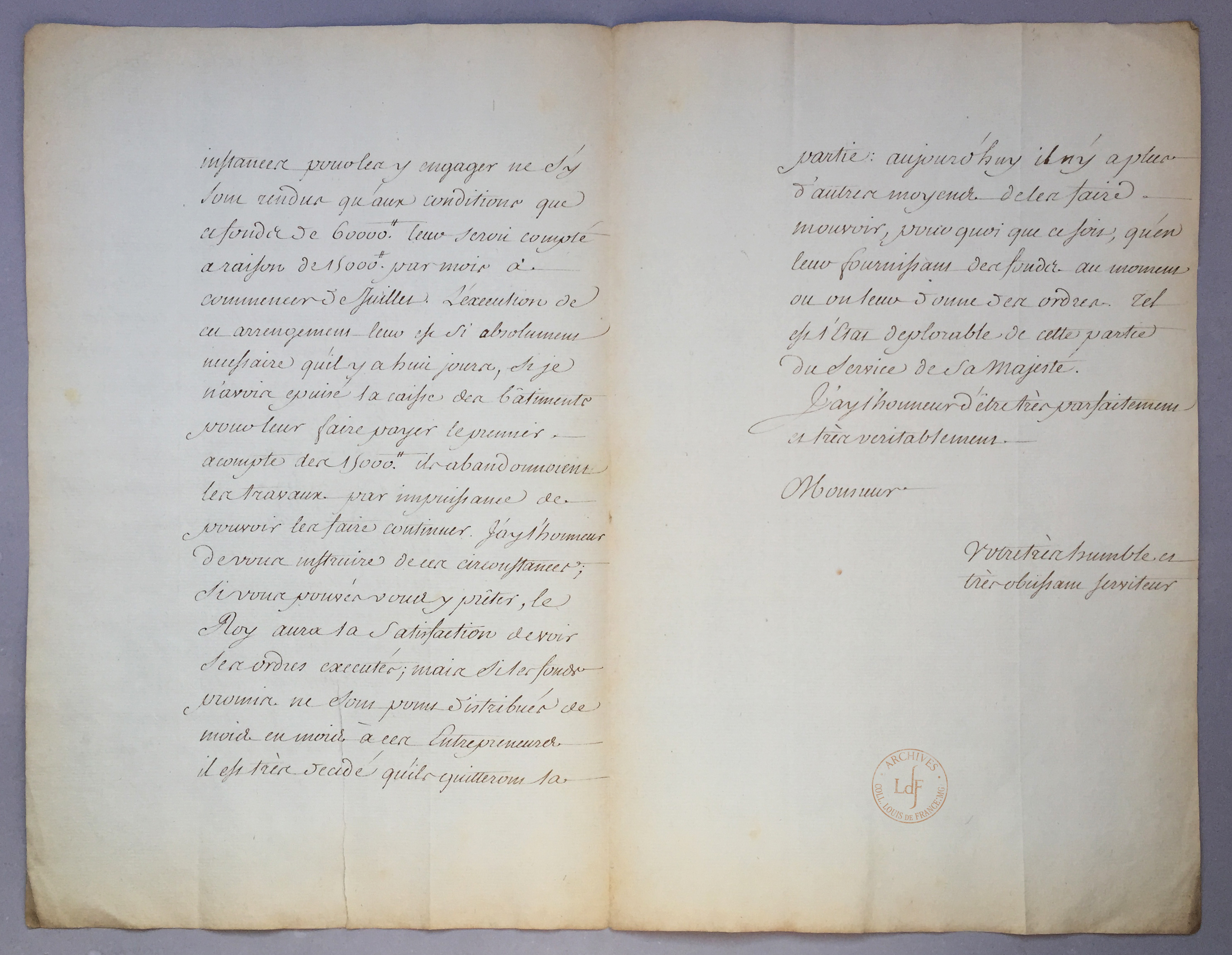 LdF ms BR-0104: Abel-François Poisson de Vandières, marquis de Marigny (1727-1781), directeur général des bâtiments et frère de Madame de Pompadour, favorite du Roi Louis XV. Lettre (non signée/ secrétaire, pour copie) adressée à César Gabriel de Choiseul-Chevigny, duc de Praslin (1712-1785), au sujet de la construction des pavillons à l'italienne du Château de Saint-Hubert (Le Perray-en-Yvelines, domaine royal de Louis XV), sous la direction du Premier architecte du Roi Ange-Jacques Gabriel (1698-1782). Il faut en effet 60000 livres pour la construction de ces pavillons et l’entrepreneur, trouvé avec difficulté, réclame 15000 livres par mois pour pouvoir continuer les travaux. Il a épuisé les caisses pour payer la première partie et demande donc à Praslin de l’aider pour le reste. « Tel est l’Etat déplorable de cette partie du service de Sa Majesté ». _______________